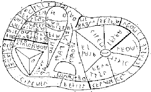 Debuxu d'un modelu etruscu fechu en bronce d'un fégadu d'oveya usáu polos arúspices, afayáu en Piacenza.